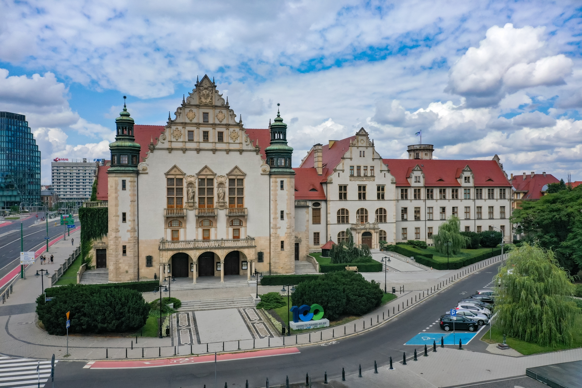 Budynek Collegium Minus w Poznaniu.